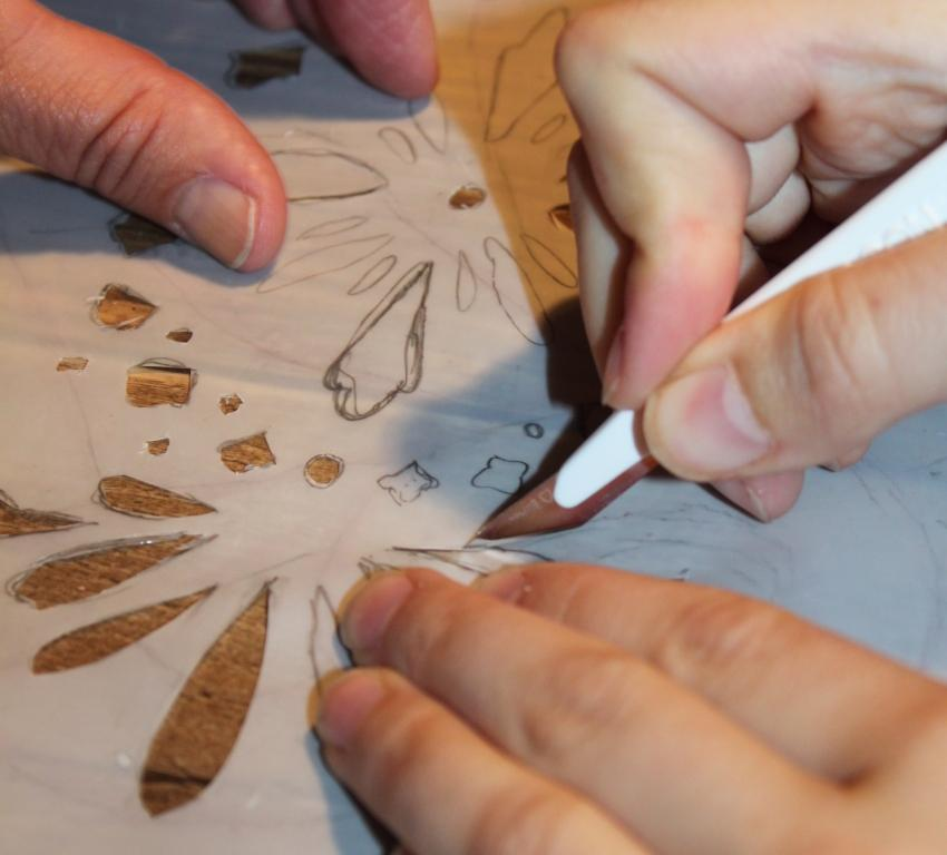 skära malla för schablon